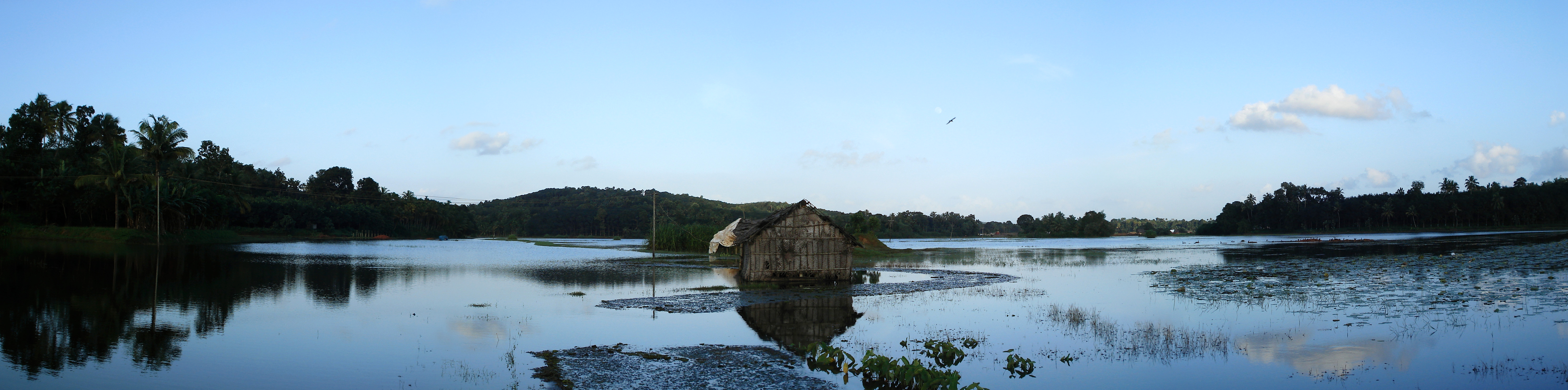 എന്റെ സ്വന്തം നാട്